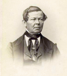 Бенедиктов, Владимир Григорьевич